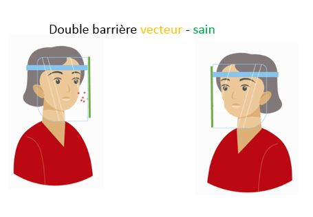 Les porteurs sont à la fois en logique de protection des autres et de soi par un effet double barrière